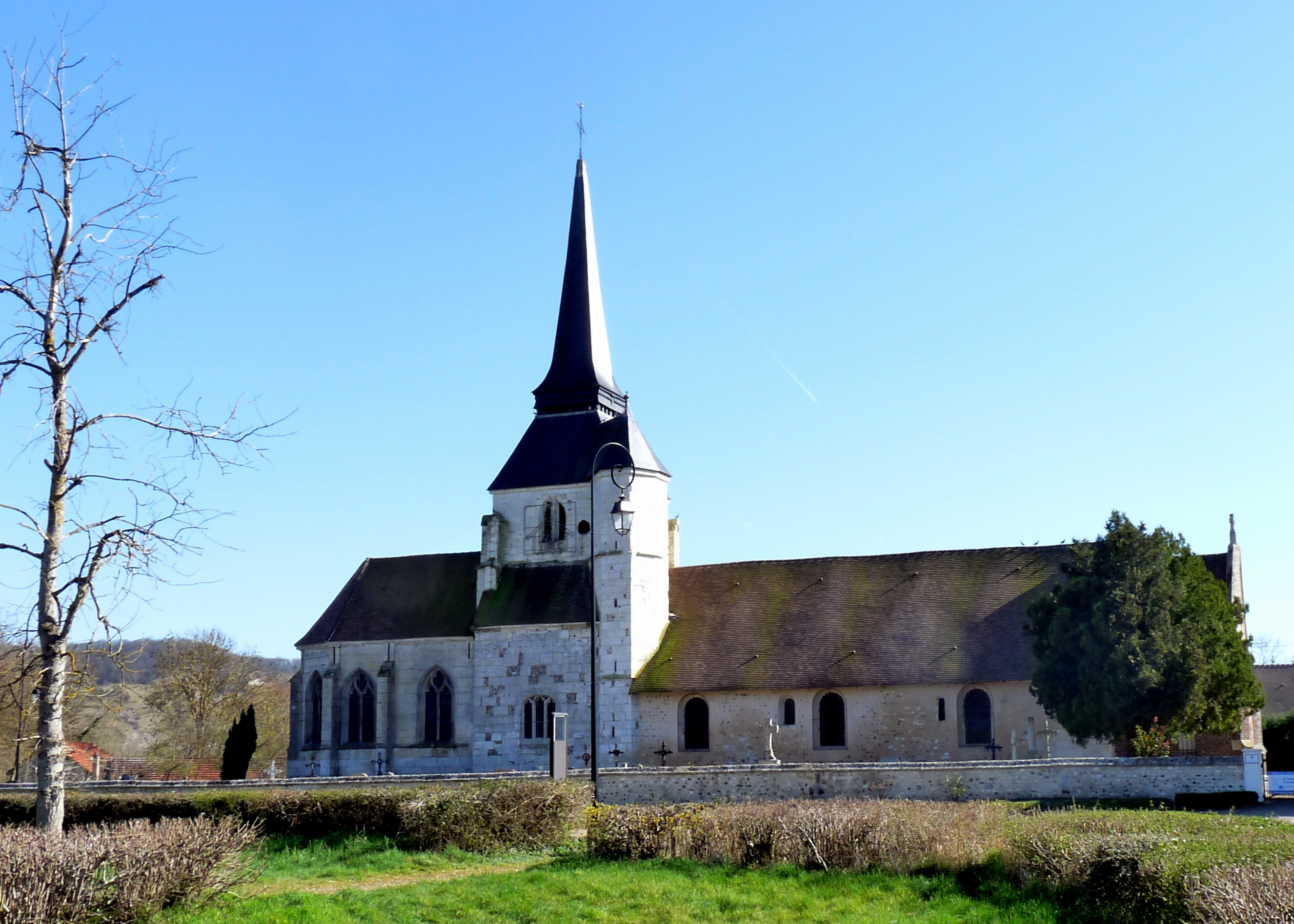 Église Saint-Quentin de Poses .